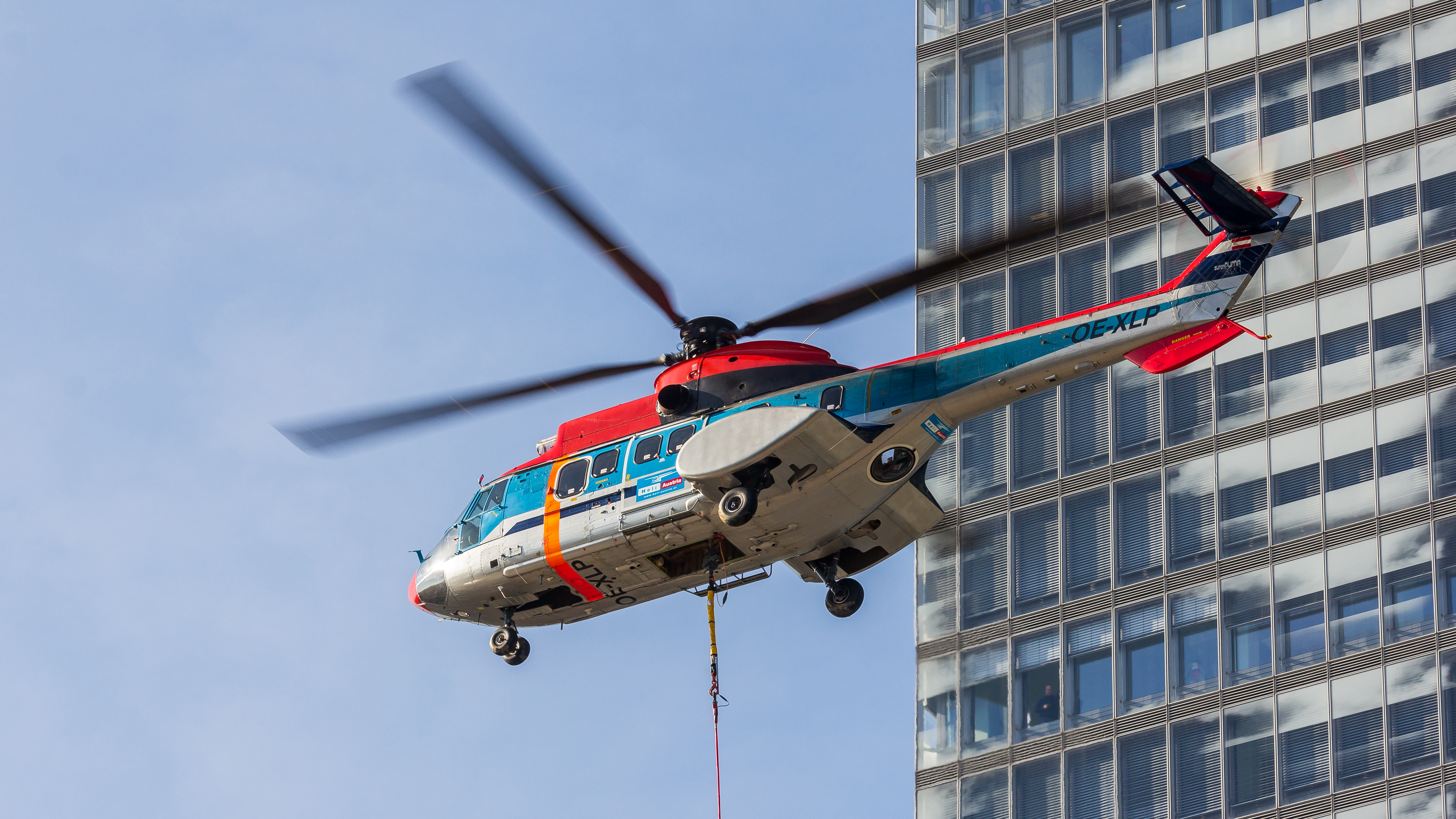 Montageflug von Klimatechnik mit einem Helikopter (Eurocopter AS332 L1 Super Puma der Heli Austria, Registrierung OE-LXP) am KölnTurm Februar 2018. Zuerst wurde alte Klimatechnik zum Boden abgelassen, danach neue Klimatechnik auf das Dach des KölnTurms hochgehoben.